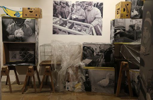 Ausstellungseröffnung der Sonderausstellung Der Wasserburger Taubenmarkt im Museum Wasserburg a. Inn. Die raumübergreifende Fotoinstallation des Fotokünstlers Andreas Bohnenstengel im Museum Wasserburg geht zurück auf eine Fotodokumentation der Märkte von 1996 und 1997. Sie zeichnet einen Markttag ausgehend von der Ankunft der Händler in der Nacht und dem anschließenden Markttreiben nach. Dabei gelingt es durch die individuelle künstlerische Perspektive Geschichte und Seele des Wasserburger Taubenmarktes erlebbar zu machen.